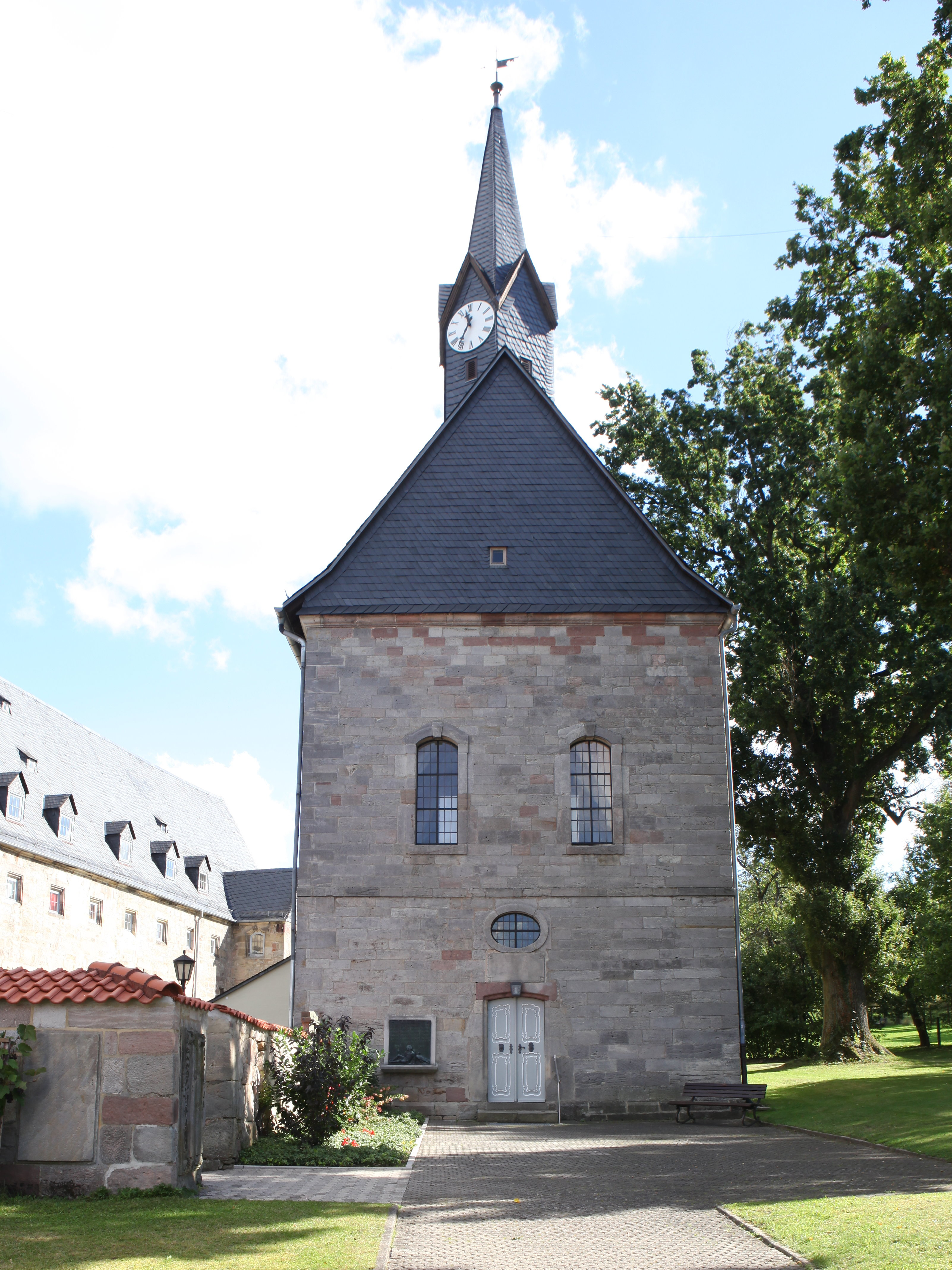 Evangelische Christuskirche in Rödental, OT Mönchröden, Landkreis Coburg